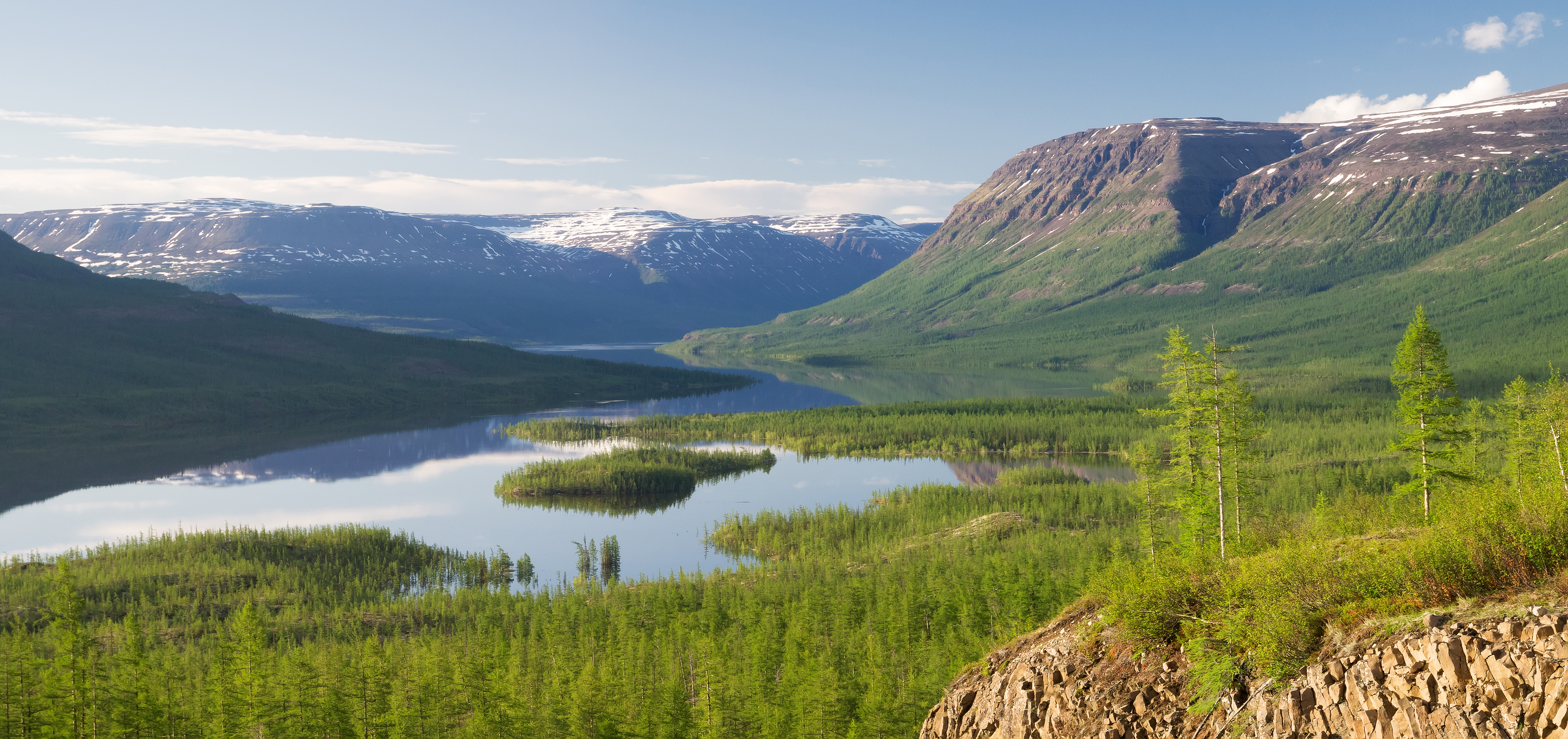 Плато Путорана, озеро Дюпкун This image is related to the protected area of Russia number 2400003